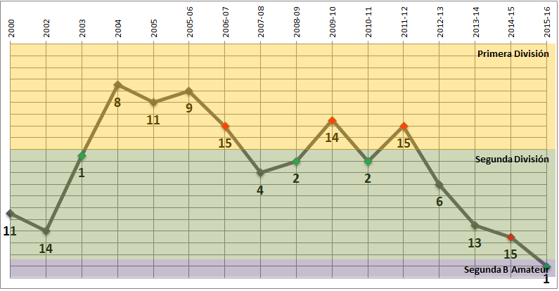 Ultimas temporadas